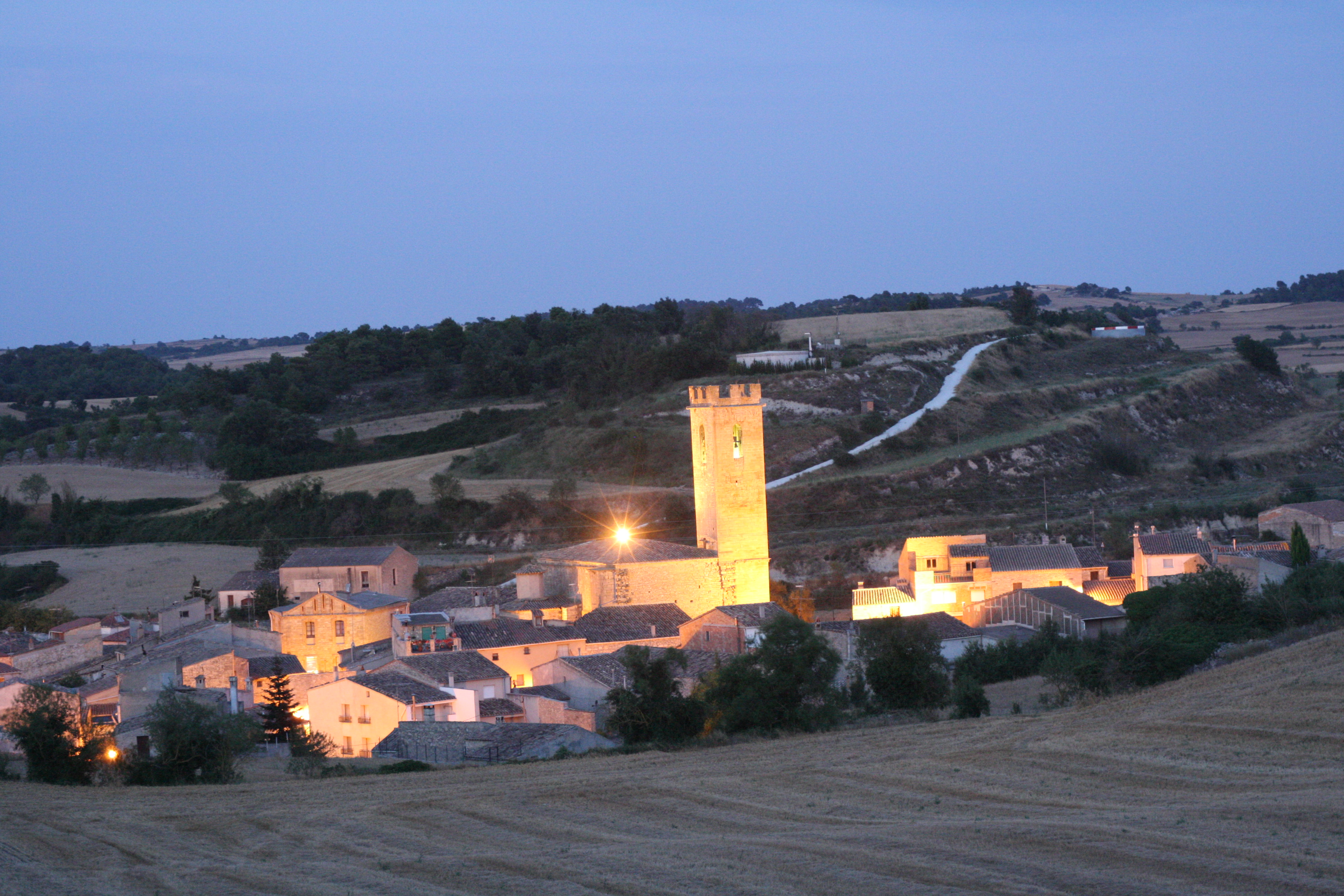 Conesa